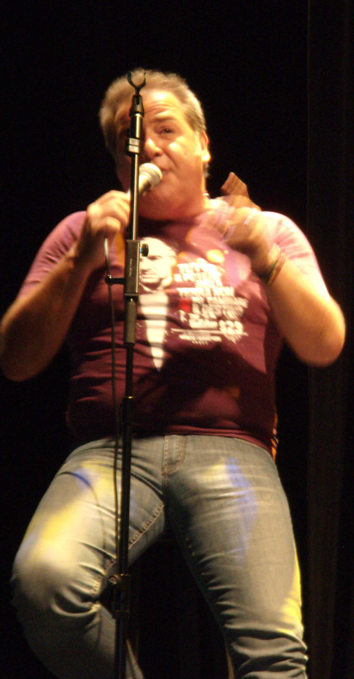 Marcos Valadão Rodolfo, mais conhecido como Nasi. Ex-vocalista da banda de rock Ira!